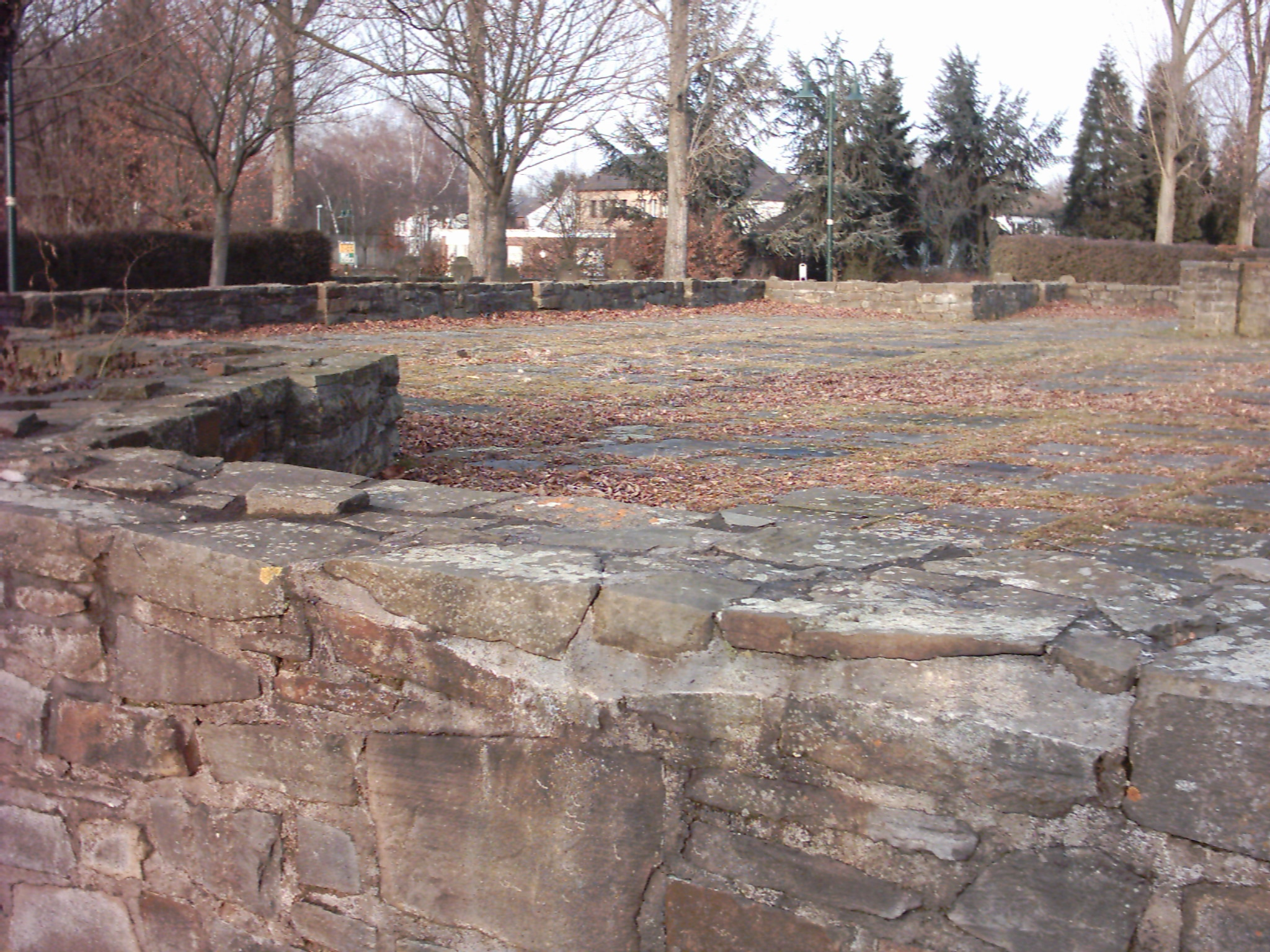 Alte (zerstörte) Kirche von Sankt Augustin-Menden